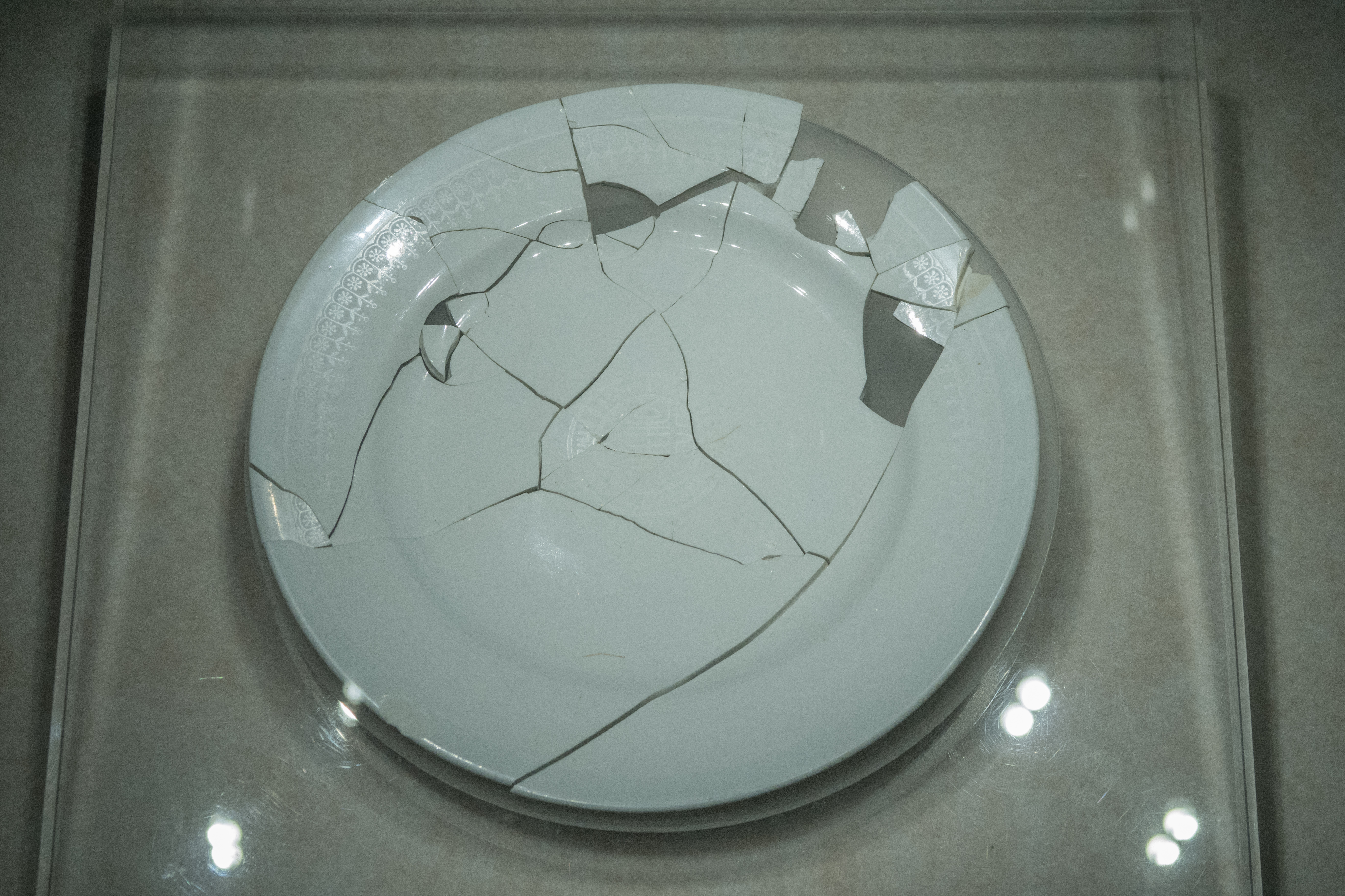 白釉瓷盘（带致远舰徽），中国港口博物馆特展“致敬致远舰”展出